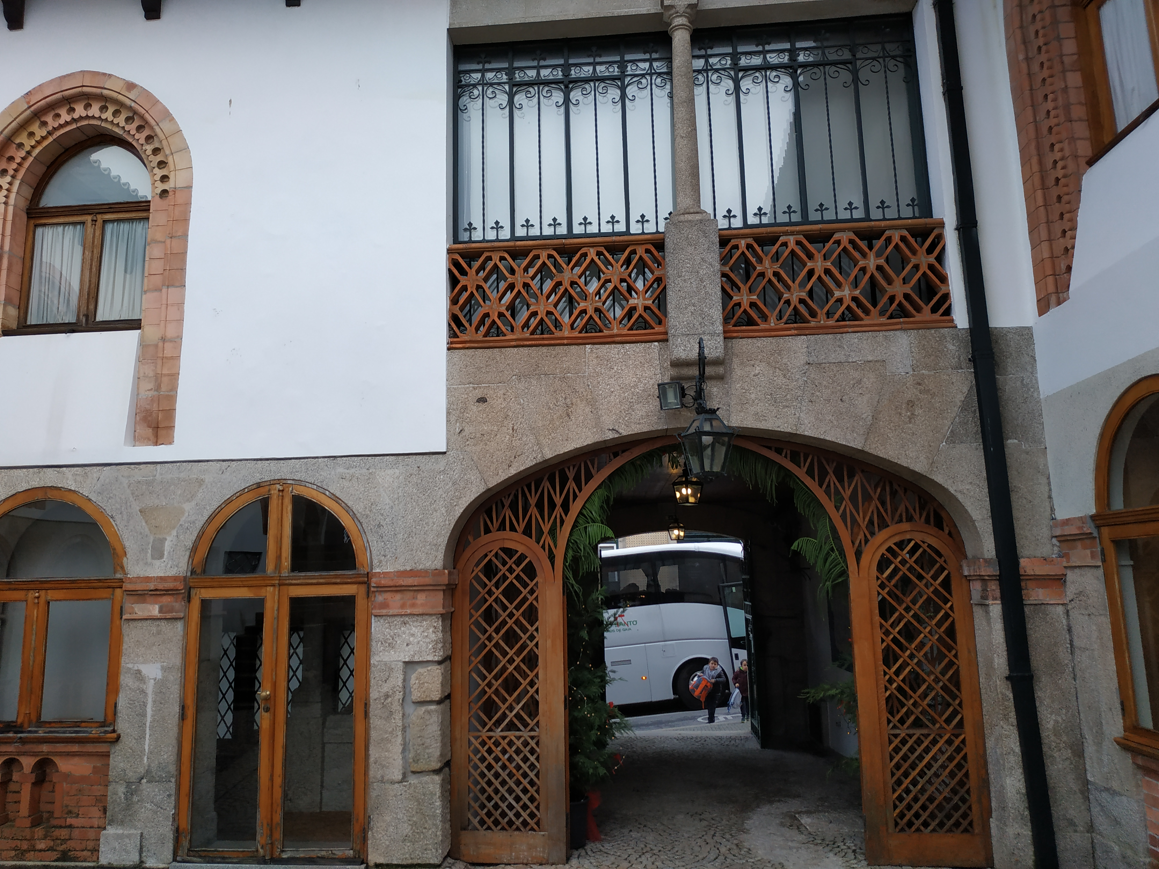 Vila Nova de Gaia, Portugal